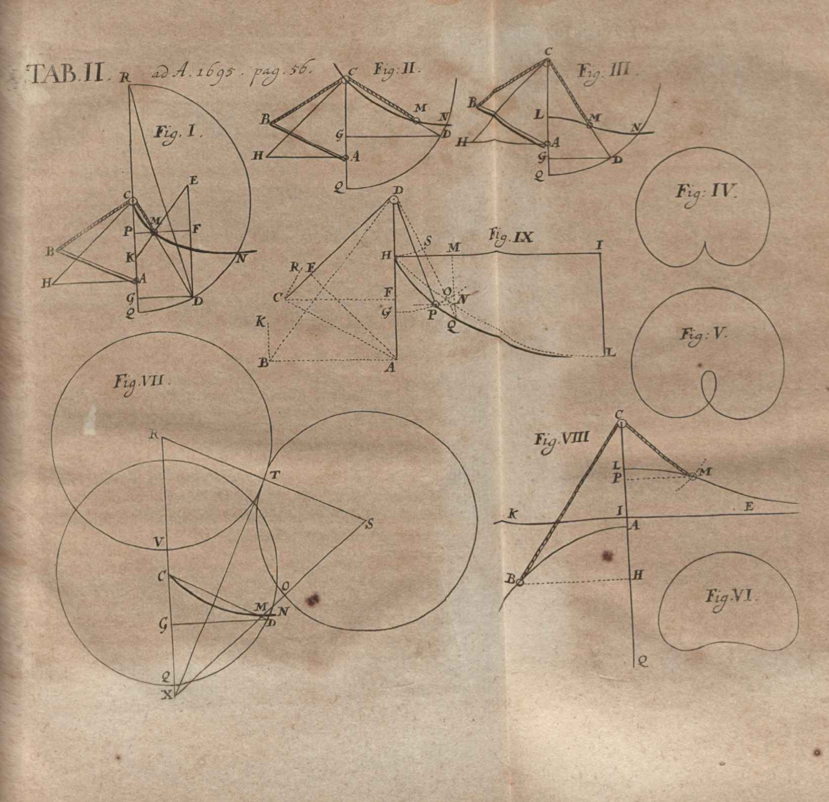 Illustration